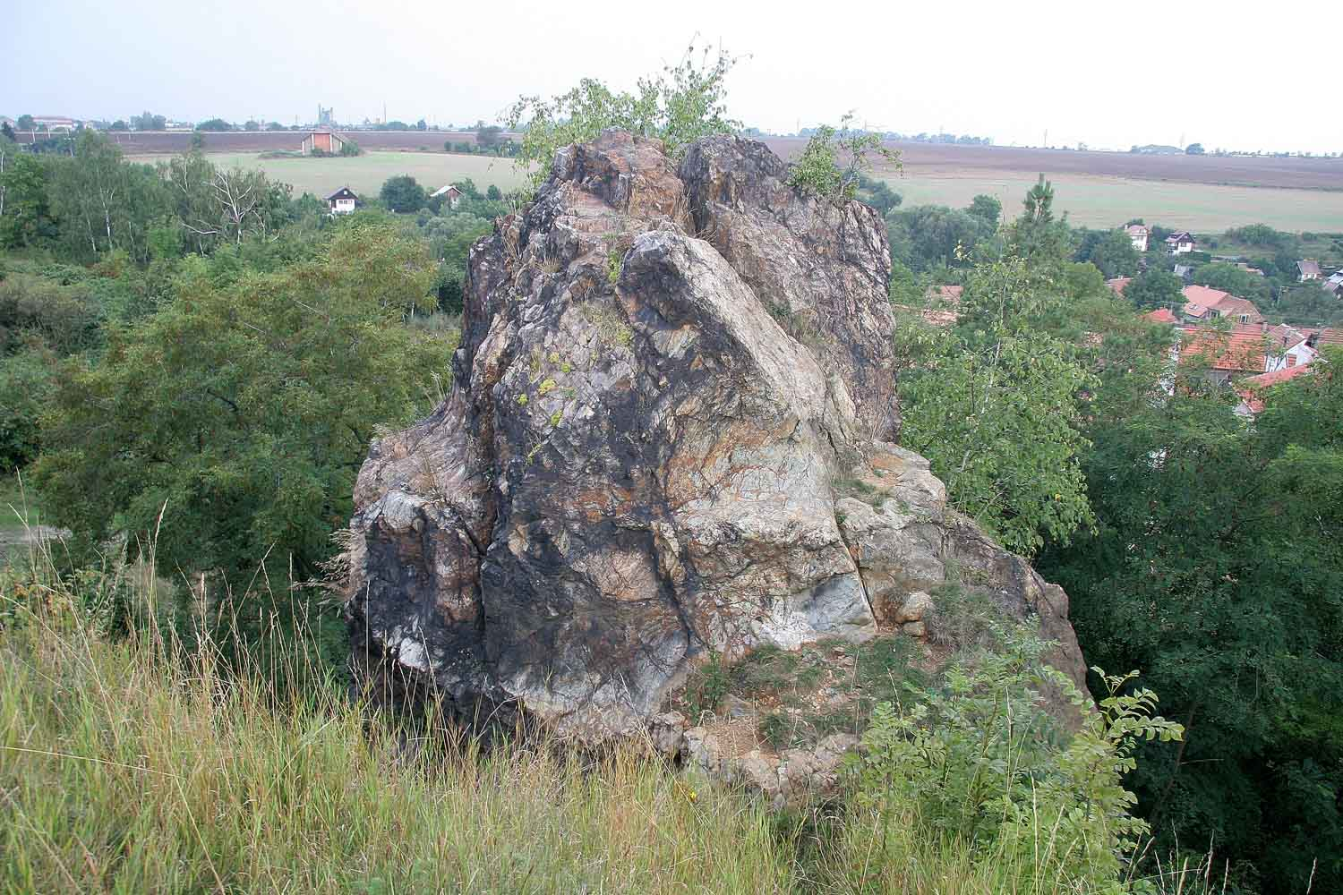 Natural monument Kněživka, district Praha-západ, Czech republic autor:Prazak date: 18. 8. 2006